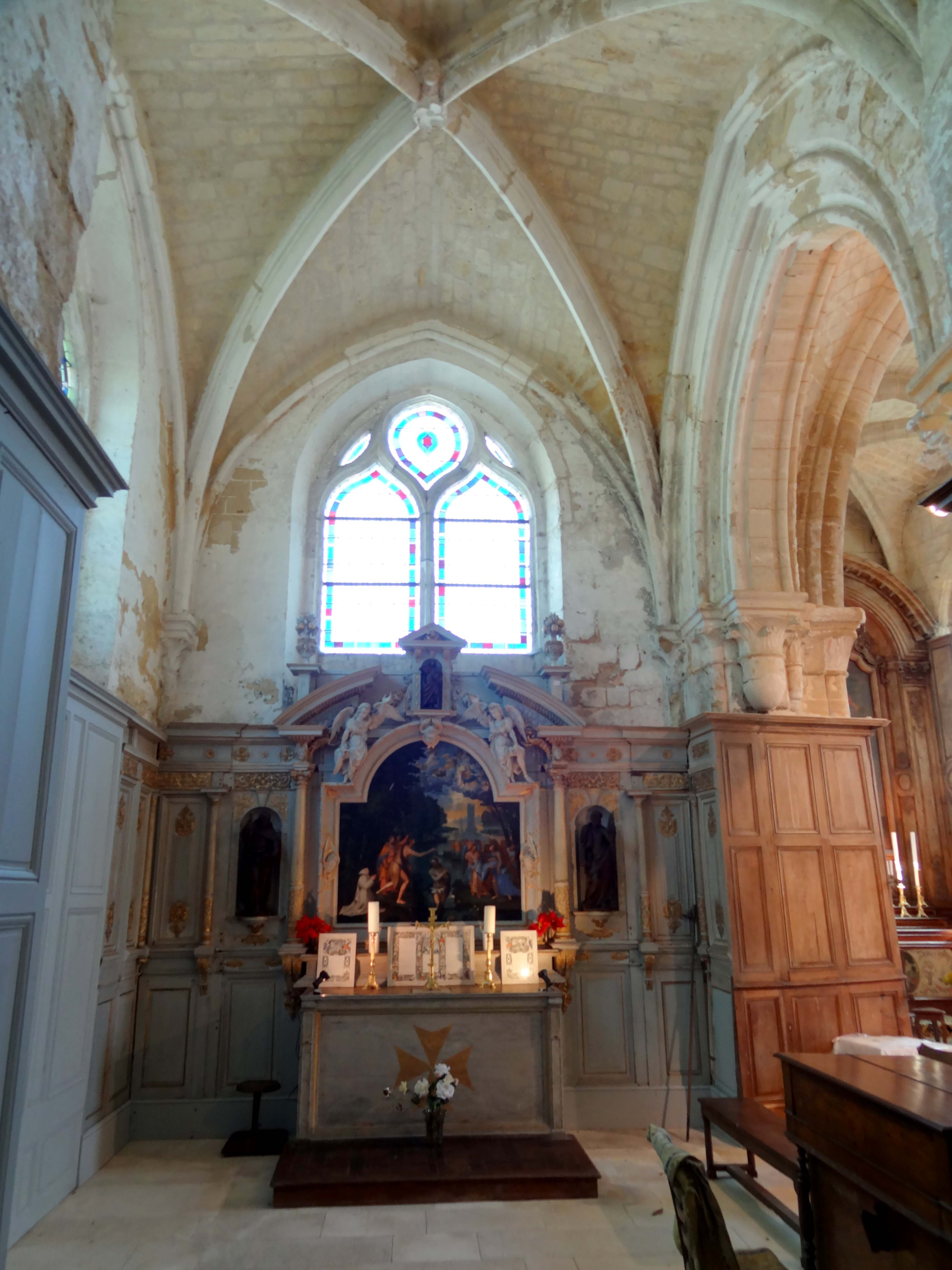 Intérieur de l'église - voir titre.